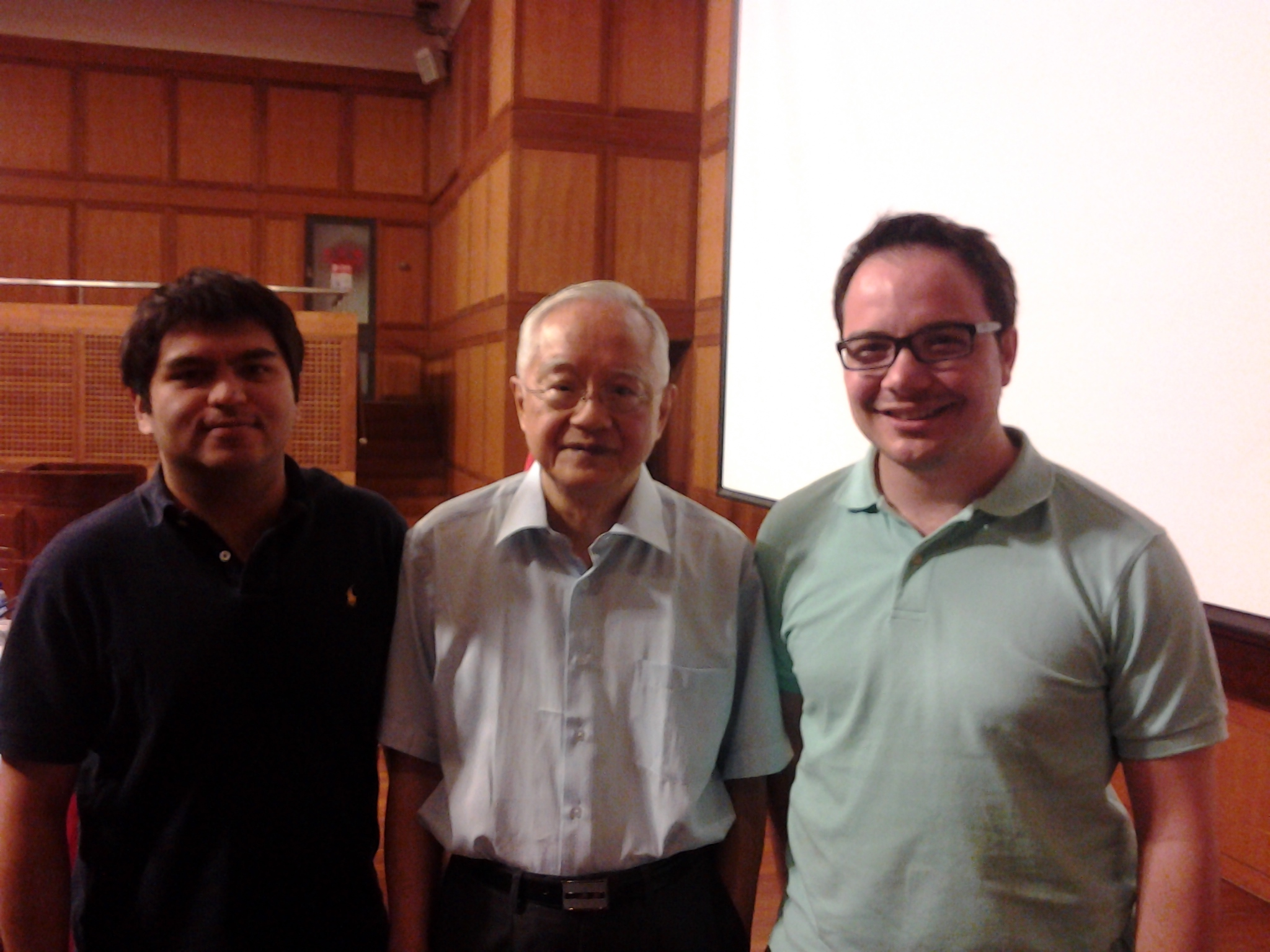 El joven profesor Wu Jinglian, a sus 81 años, nos lo acaba de explicaren su clase de hoy 110519 (centenario del abuelo Salvador, otro gran maestro ya difunto): “Un individuo no puede aspirar a una vida mejor en un sistema social imperfecto.”